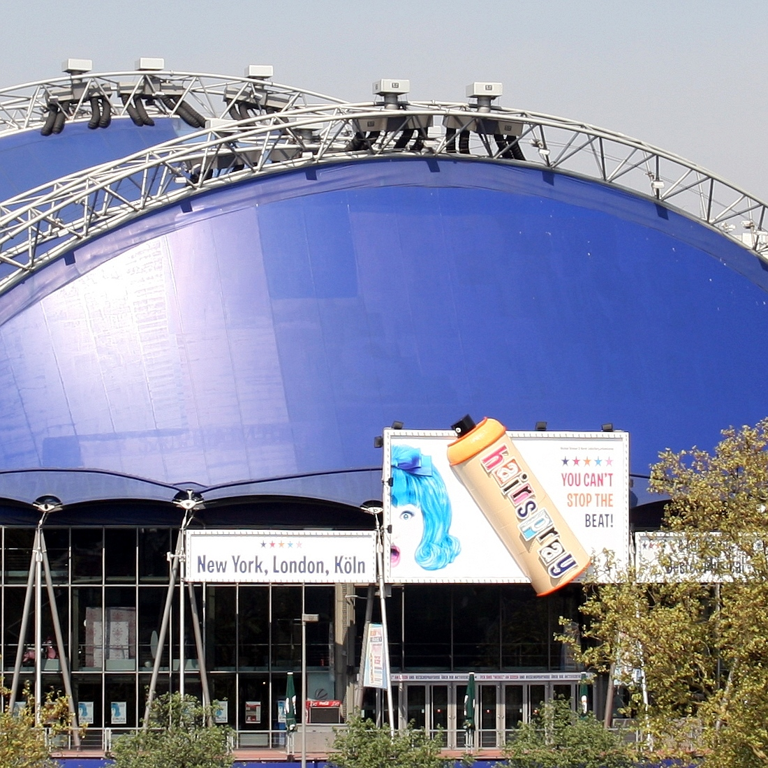 Musical Dome Köln. Reklameschilder für das Musical „Hairspray“